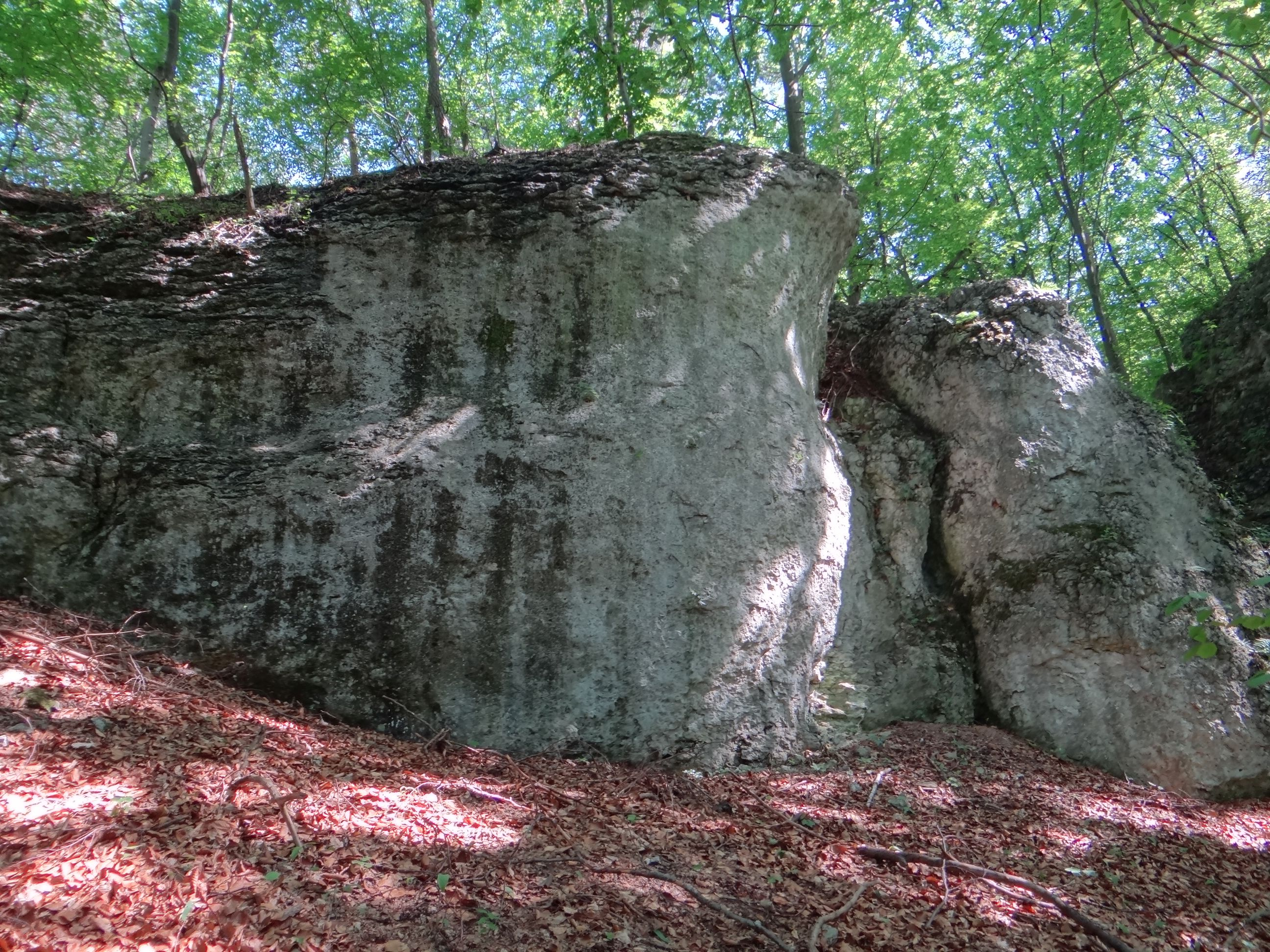 Kubińcowe Skały w Pierunkowym Dole w Nielepicach